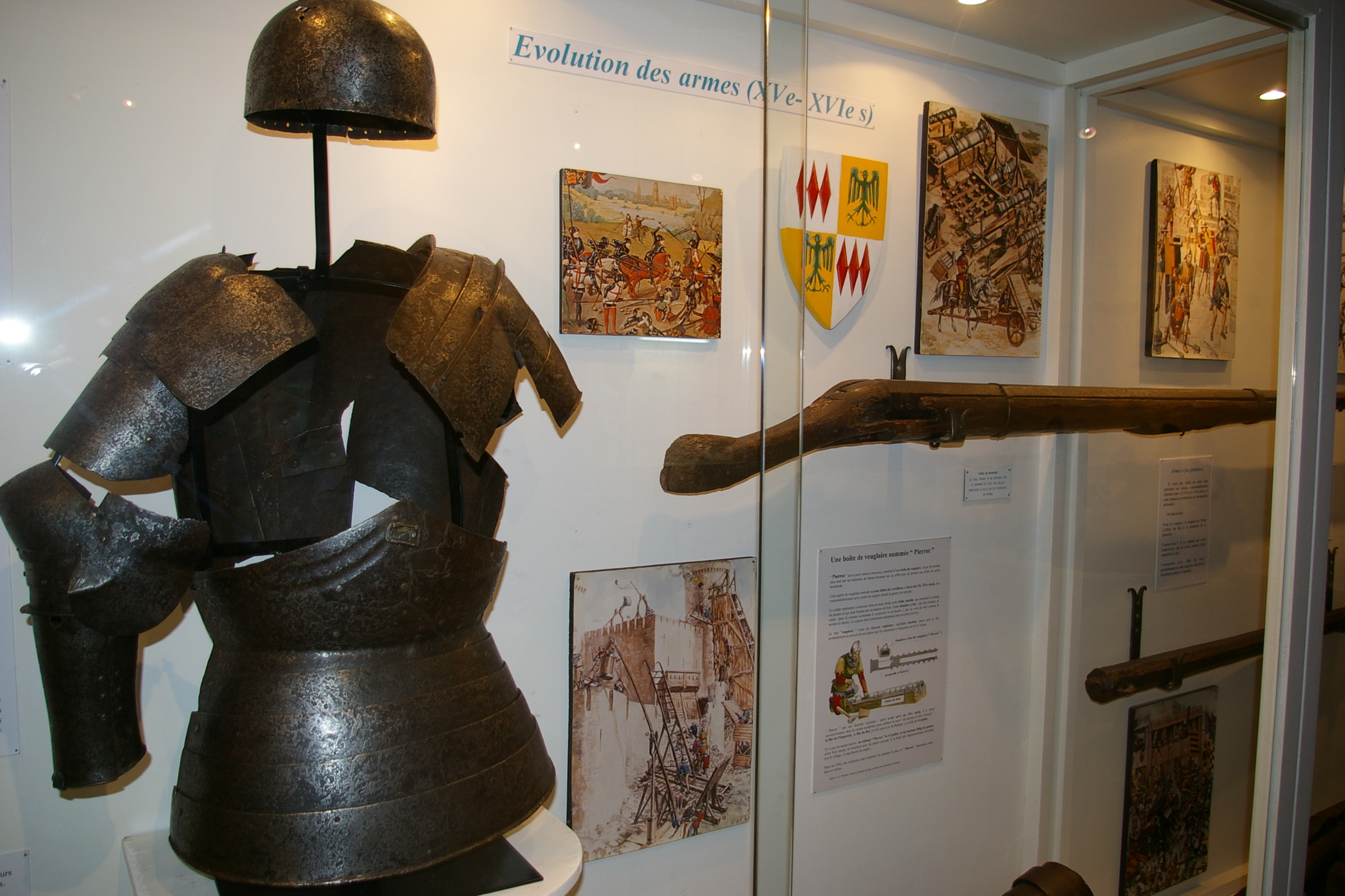 vitrine musée de l'auditoire